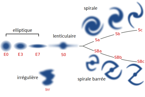 Traduction d'une image de classification des galaxies.